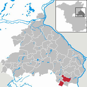 Zeschdorf in Brandenburg (Country) - District Märkisch-Oderland